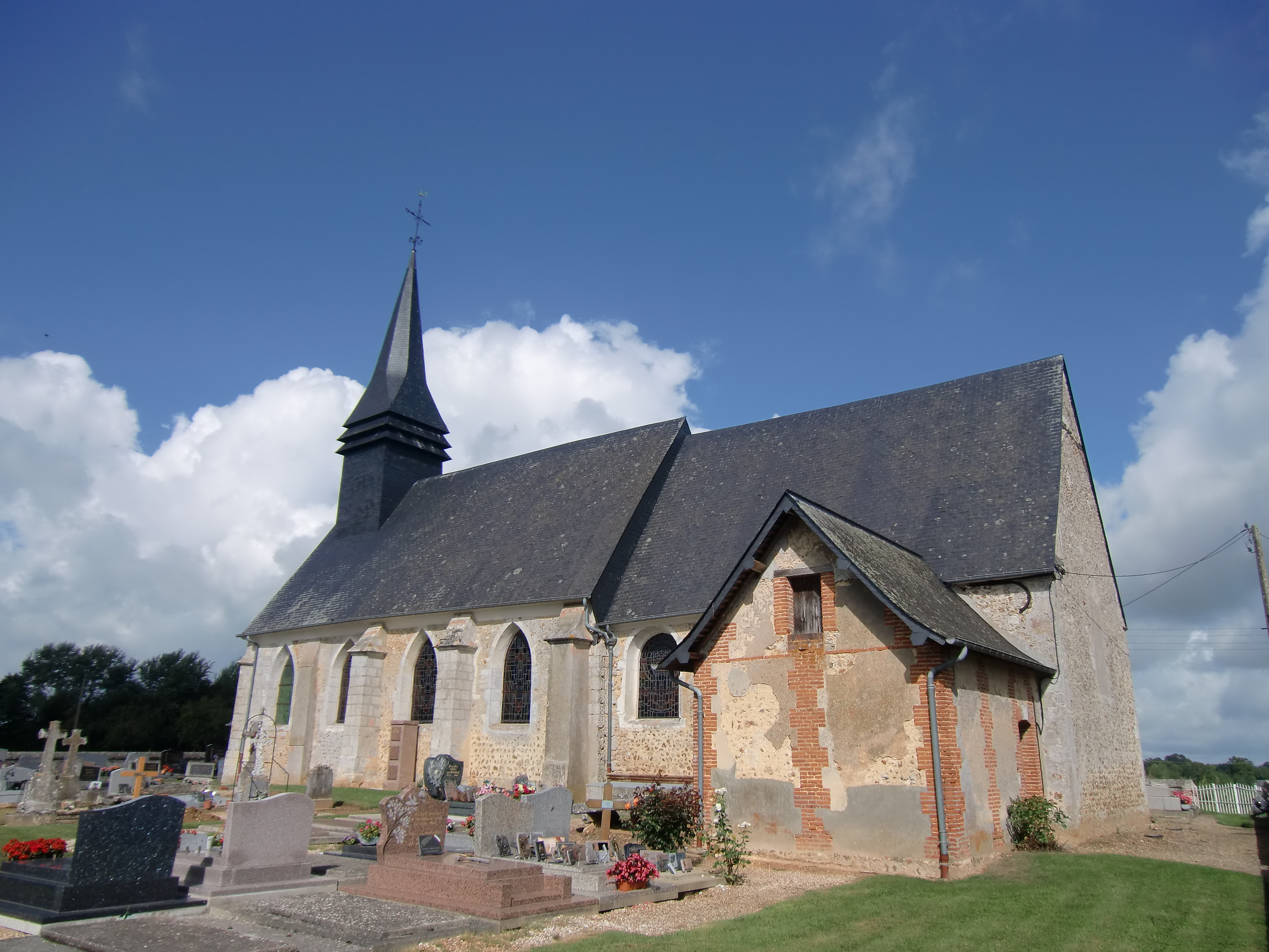 église de Fresne-Cauverville (Eure, Normandie, France)